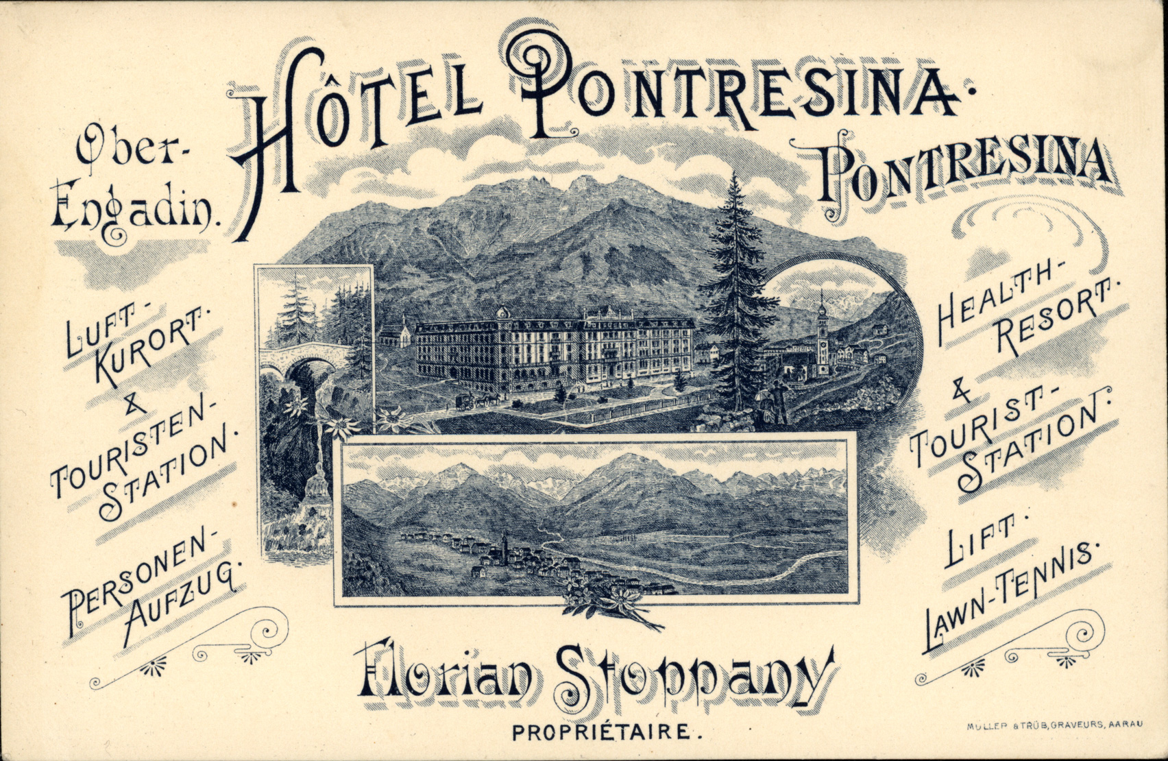 Ansichtskarte mit dem Hotel Pontresina in Pontresina, versandt 1901